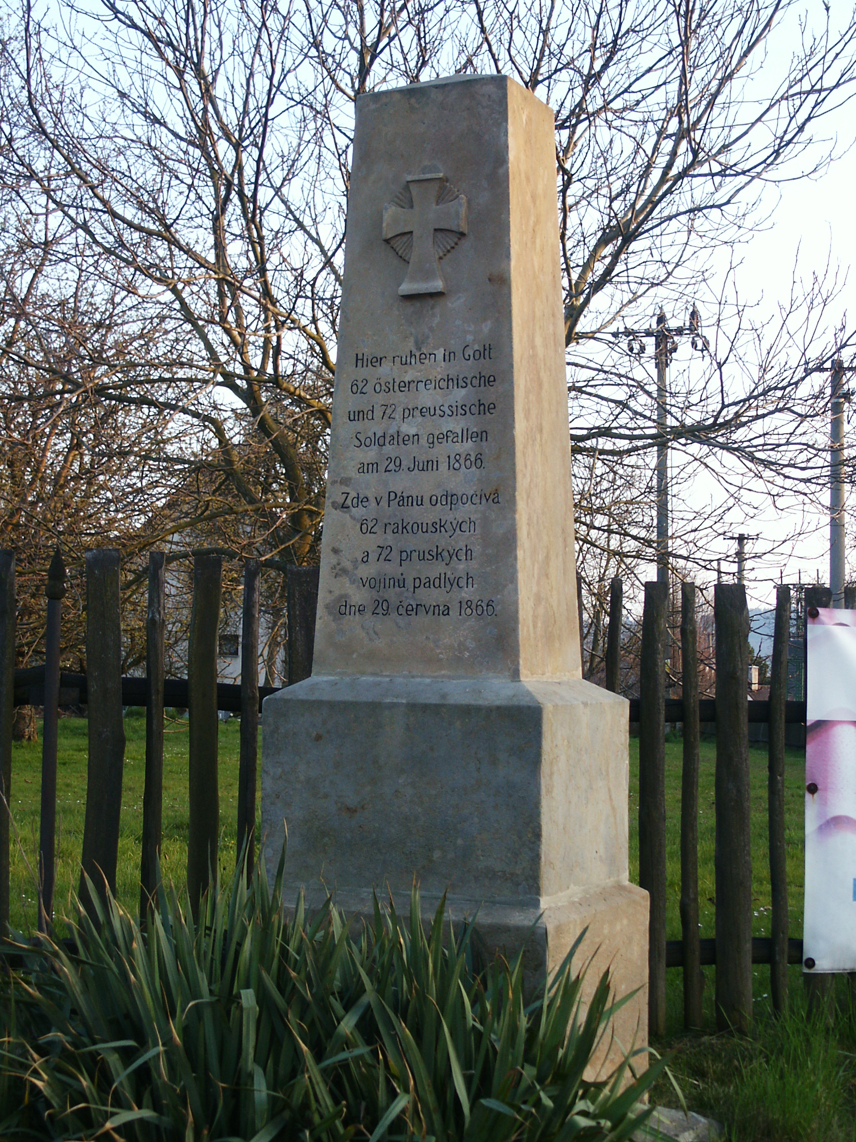 Ohaveč - pomník vojákům padlým v bitvě u Jičína 29.6.1866